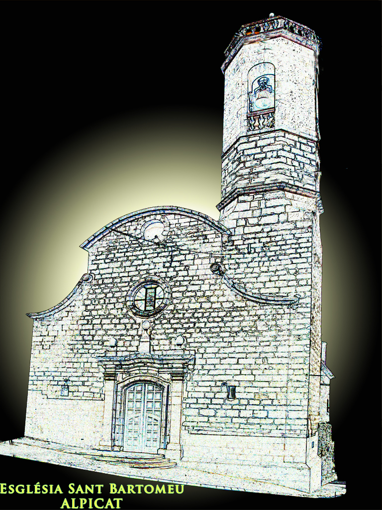 Iglesia Sant Bartomeu Alpicat (Lleida) (Catalunya)